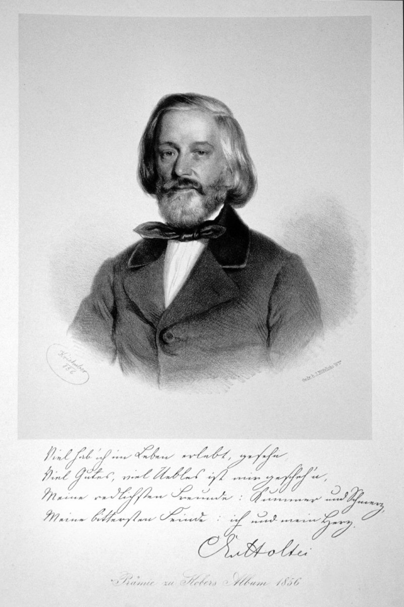 Karl von Holtei, Lithographie von Joseph Kriehuber, 1856